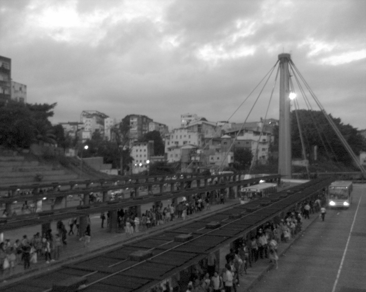 Imagem não muito boa... De celular, fazer o quê...